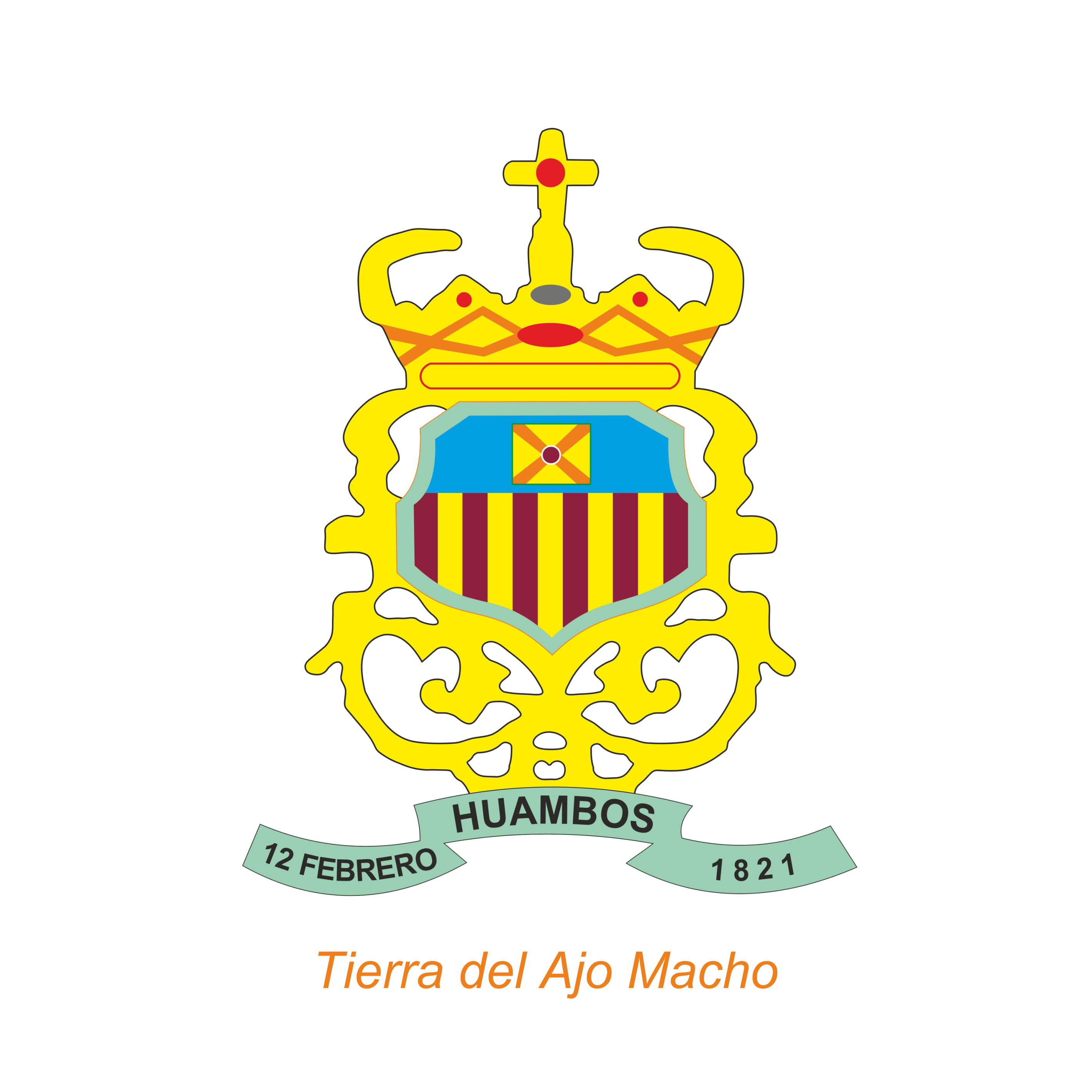 ESCUDO DEL DISTRITO DE HUAMBOS